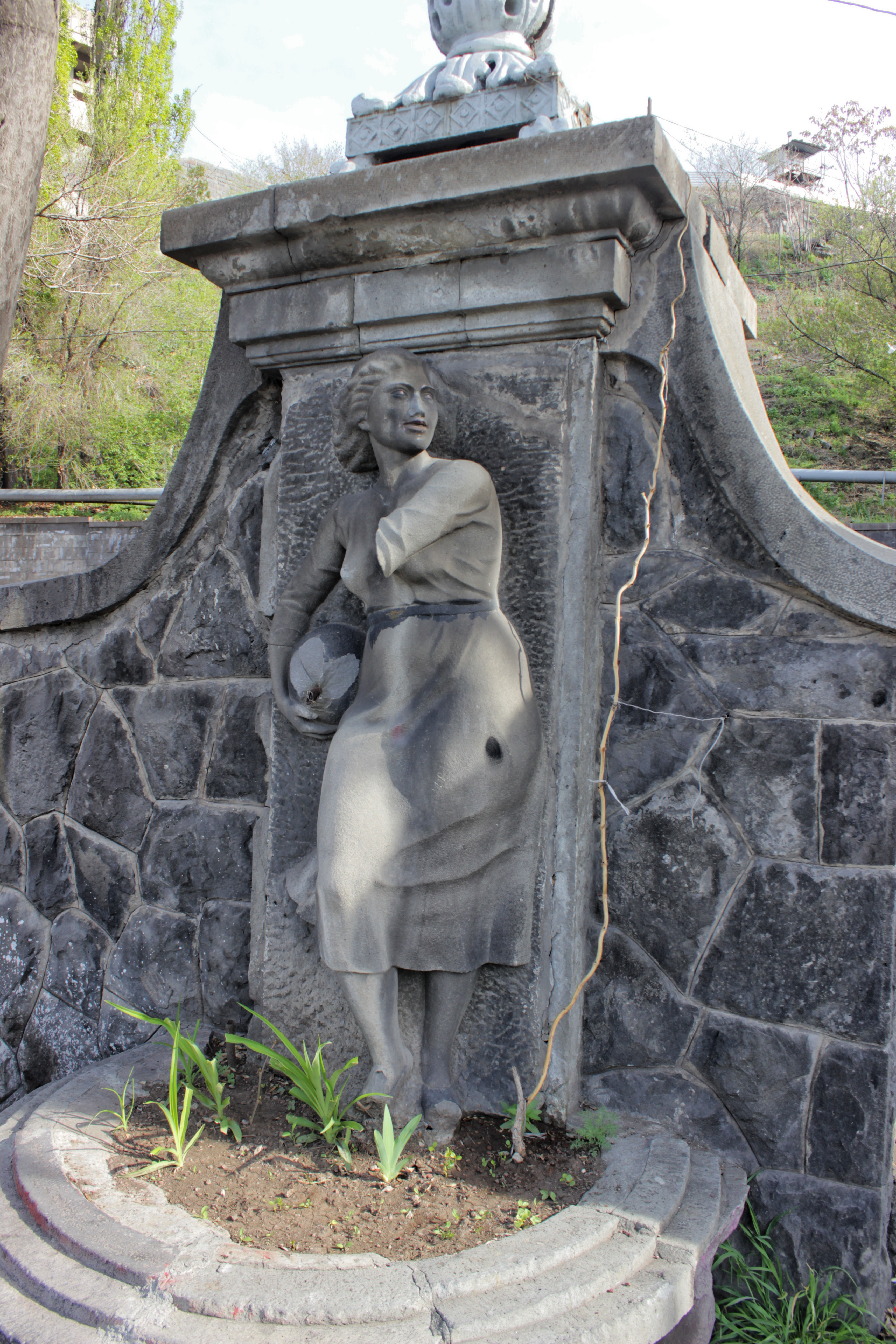 Այծեմնիկ Ուրարտուի Երևանի Աբովյան պուրակում 1939 թվականին տեղադրած «Կժով աղջիկը» քանդակը։ 6/12